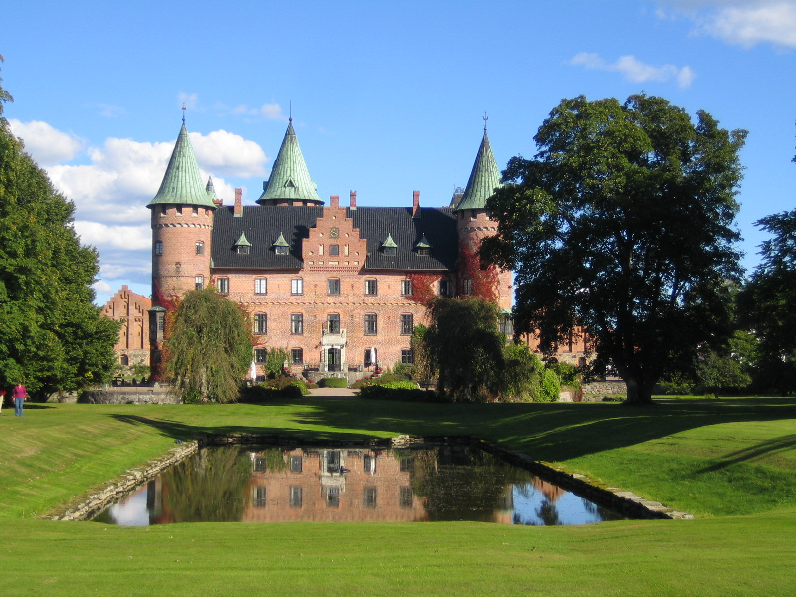 Trolleholms slott. Bilden tagen av mig själv 17 september 2005.